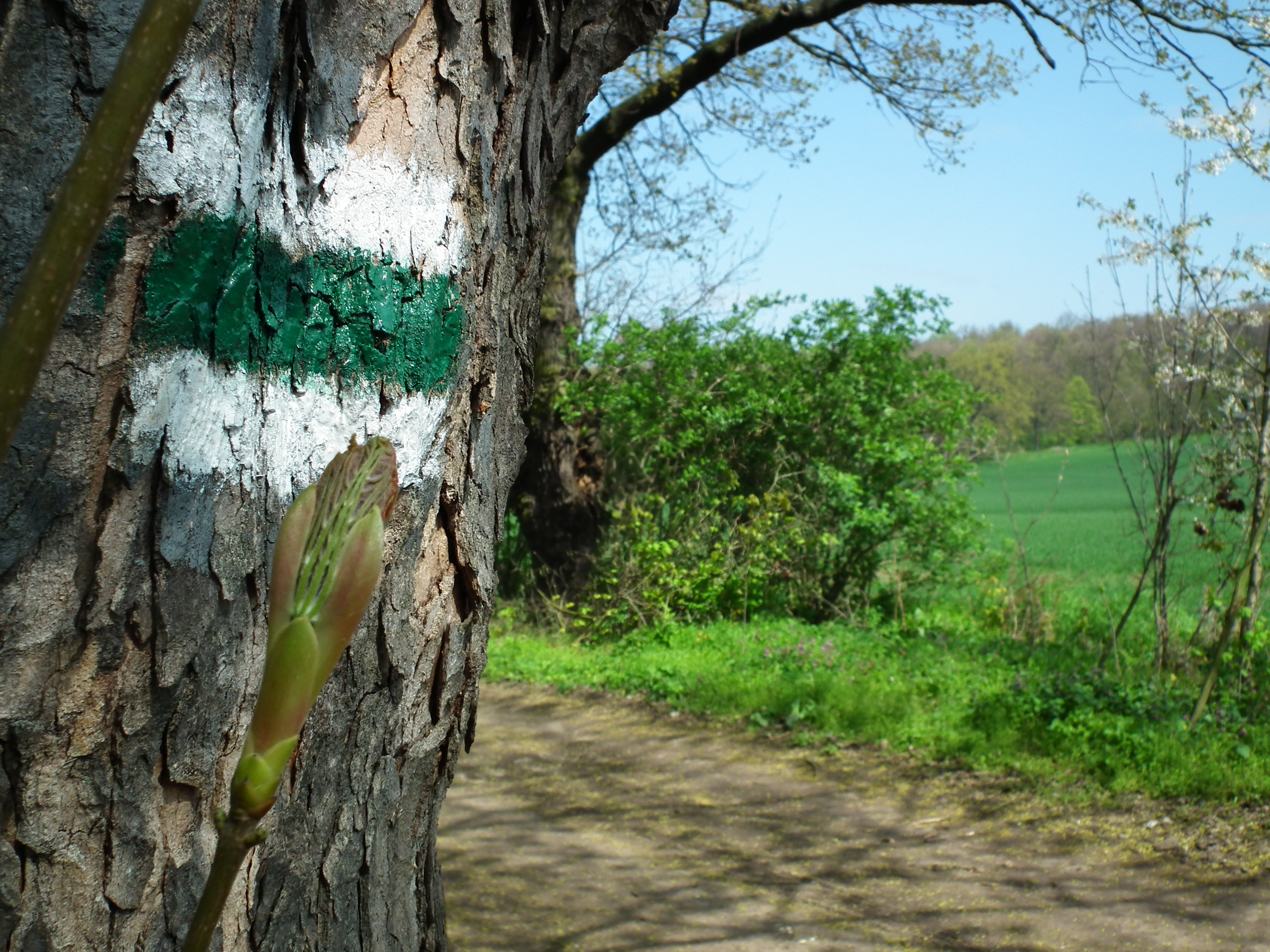 Szlak bitwy nad Kaczawą pomiędzy Krajowem, a Duninem.